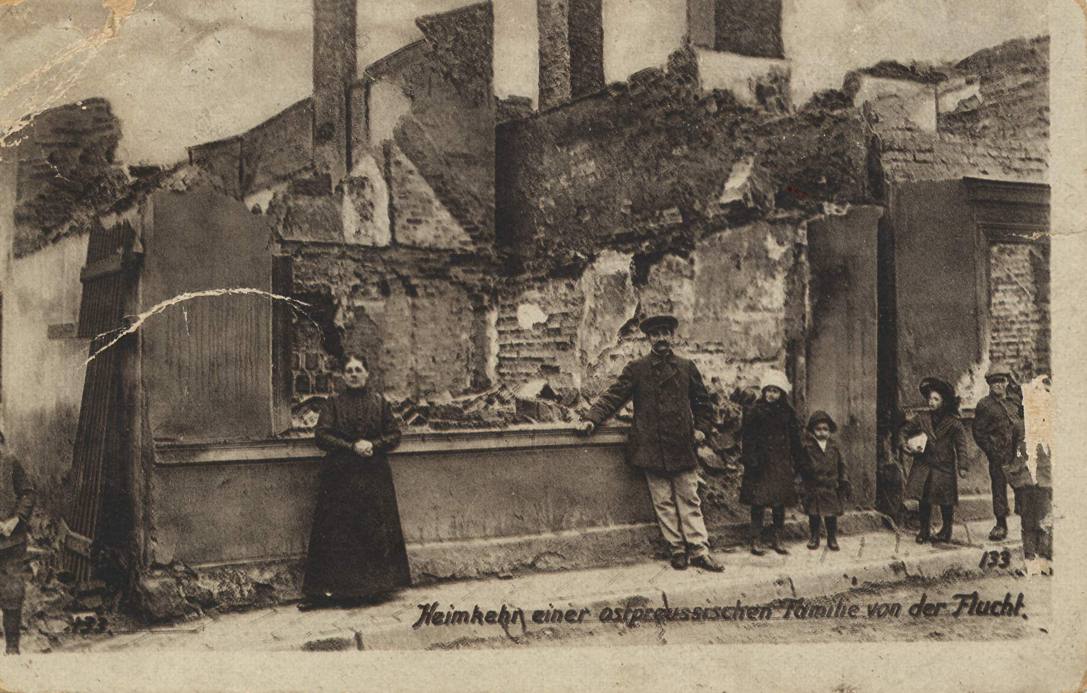 Ostpreußische Familie vor zerstörtem Haus in Orzysz (dt. Arys)